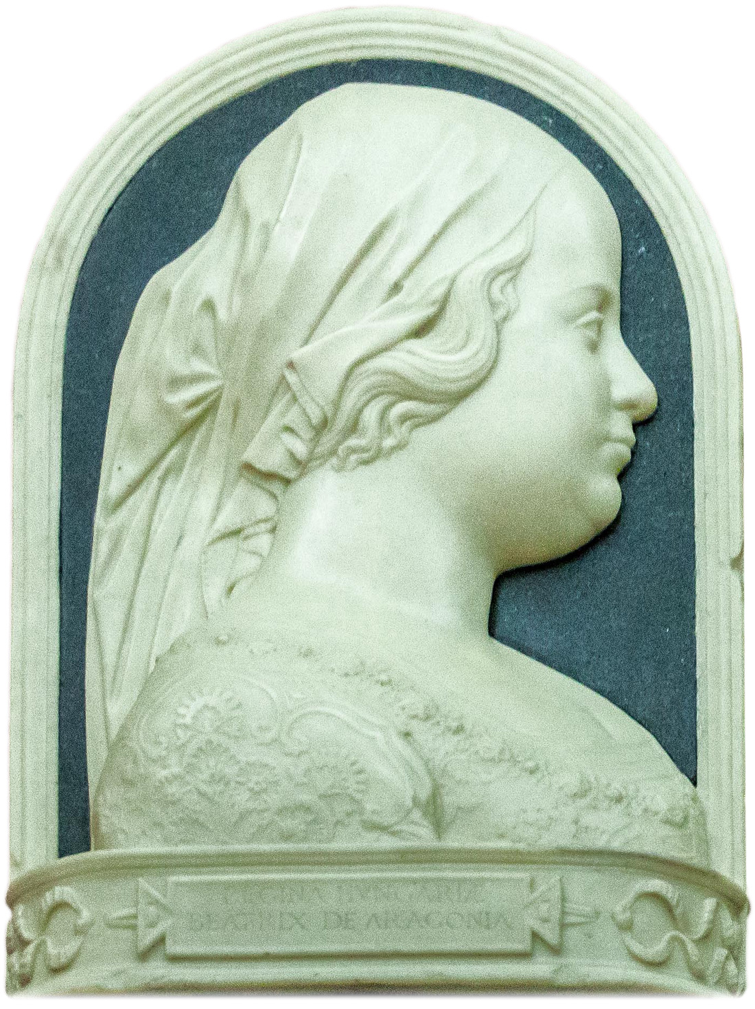 Beatrix Neapolská (1457 - 1508), kralovna uherska, chorvatska a ceska